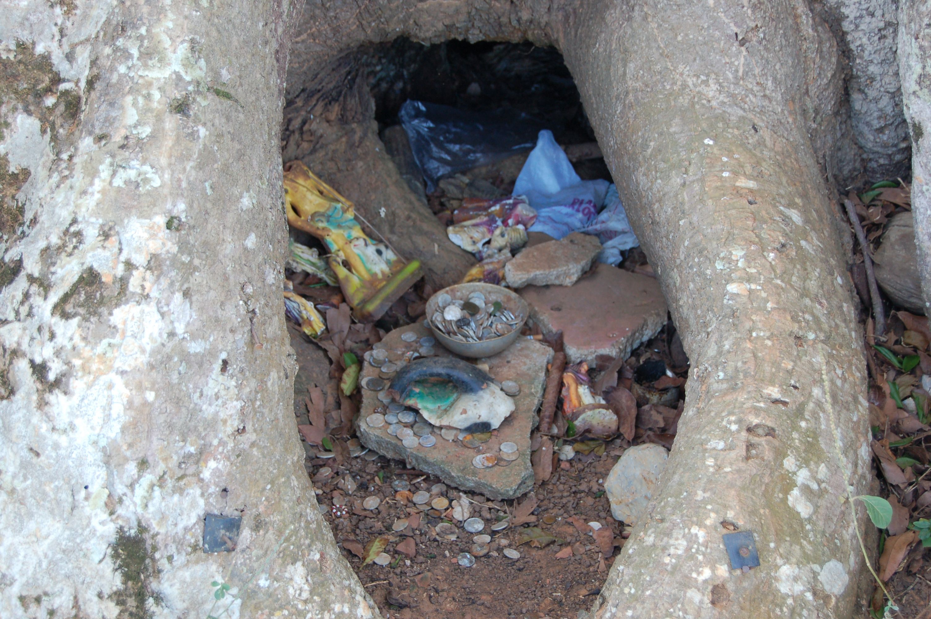 offrandes déposées entre les contreforts de la ceiba, qui est un arbre sacré pour la santería